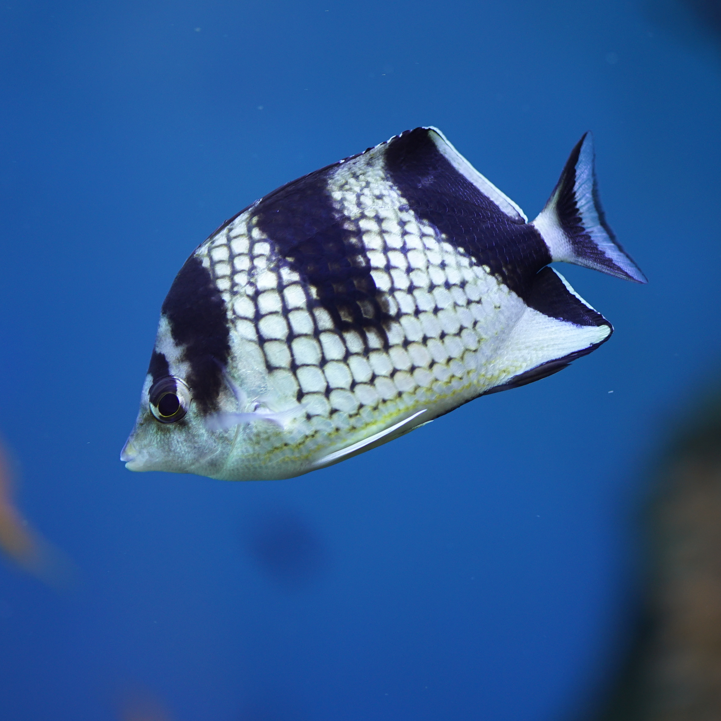 カガミチョウチョウウオ Three-band Butterflyfish, Asian butterflyfish Domain: Eukaryota • Regnum: Animalia • Phylum: Chordata • Subphylum: Vertebrata • Infraphylum: Gnathostomata • Superclassis: Osteichthyes • Classis: Actinopterygii • Ordo: Perciformes • Familia: Chaetodontidae • Genus: Chaetodon Wikispecies has an entry on: Chaetodon argentatus. Species Chaetodon argentatus Smith and Radcliffe, 1911 動物界 脊索動物門 条鰭綱 スズキ目 チョウチョウウオ科 チョウチョウウオ属 Location: Tokyo Sea Life Park (Kasai Rinkai Suizokuen), Japan Other photos: NCBI Taxonomy ID:39041 ITIS link: Chaetodon argentatus Smith and Radcliffe, 1911 (mirror) EOL link: Chaetodon argentatus uBio search link: Chaetodon argentatus